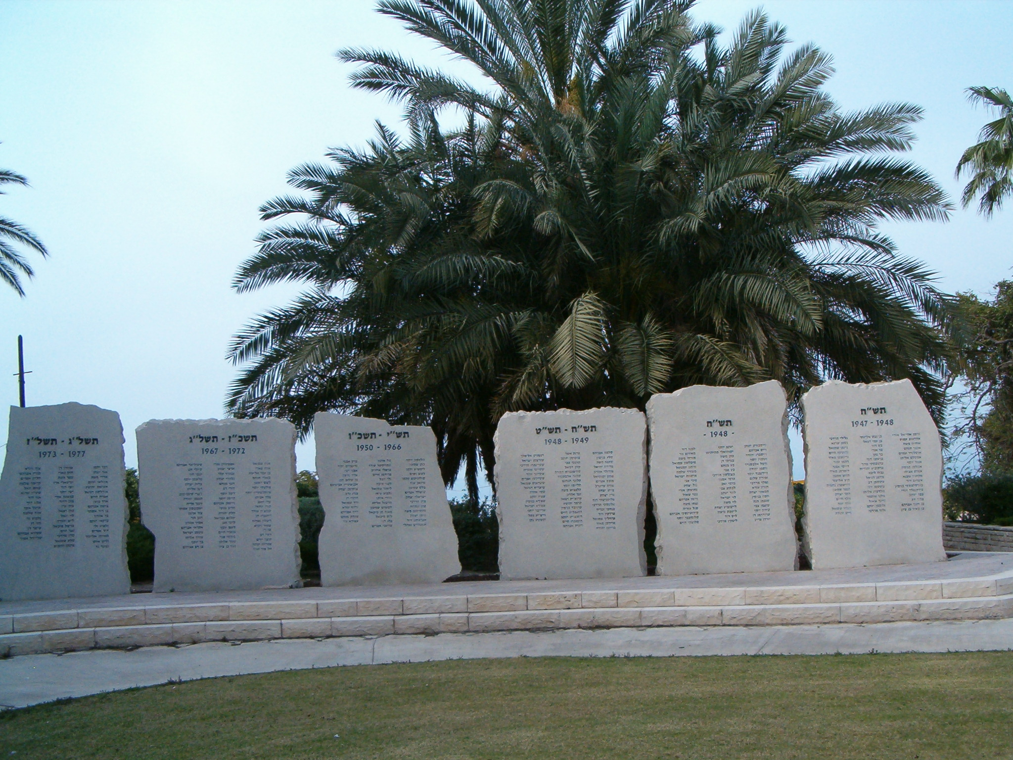 אנדרטת זיכרון בצומת צמח לזכר הנופלים במערות ישראל בני עמק הירדן. צילם י.ש. 14:49, 14 אפריל 2006 (UTC)